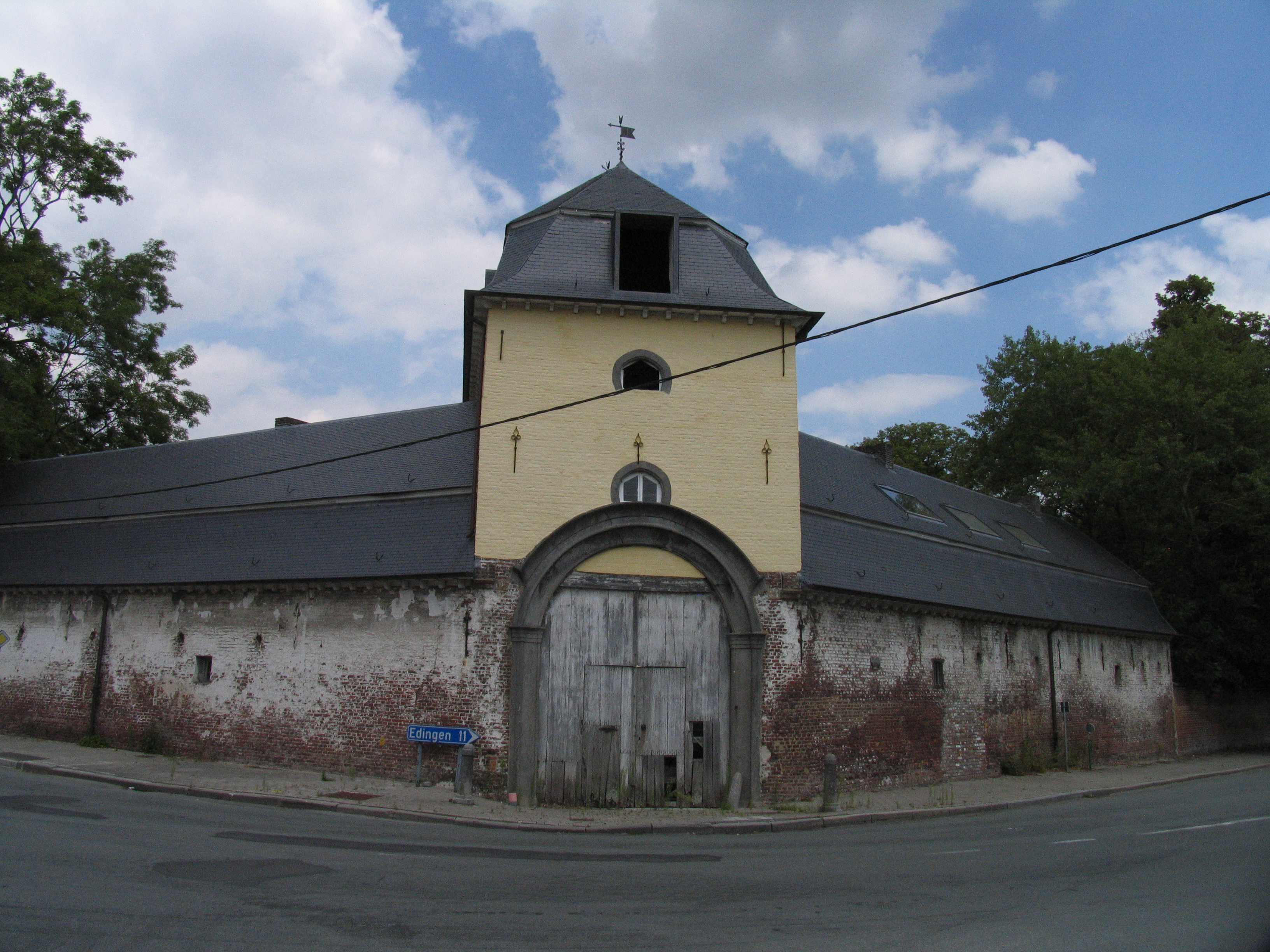 Geraardsbergen - Viane - Edingseweg 440 - Kasteel De Blondel De Beauregard